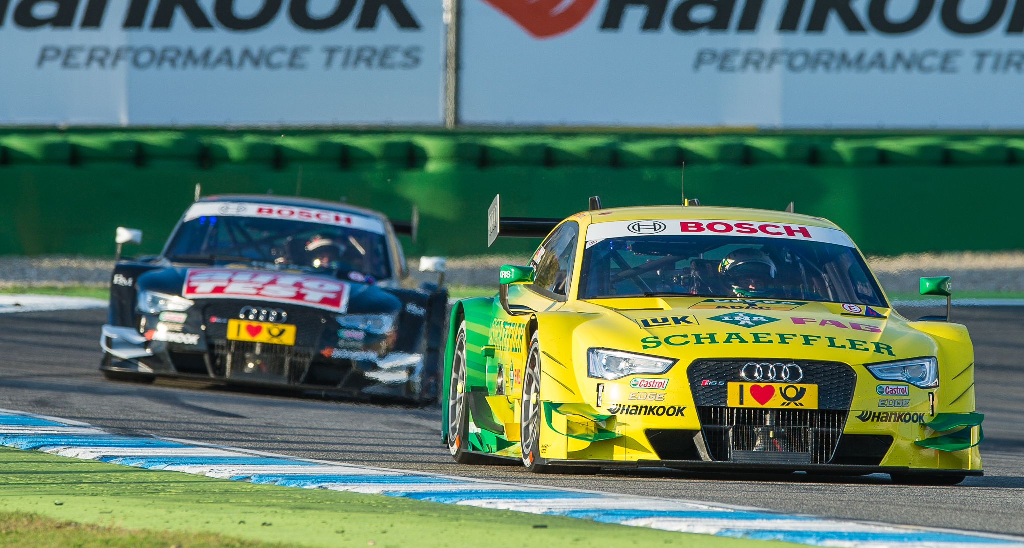 AUTO TEST Audi RS 5 DTM,DTM,Deutsche Tourenwagen Masters,Hockenheimring,Mike Rockenfeller,Motorsport,Phoenix Racing GmbH,Schaeffler Audi RS 5 DTM,Timo Scheider